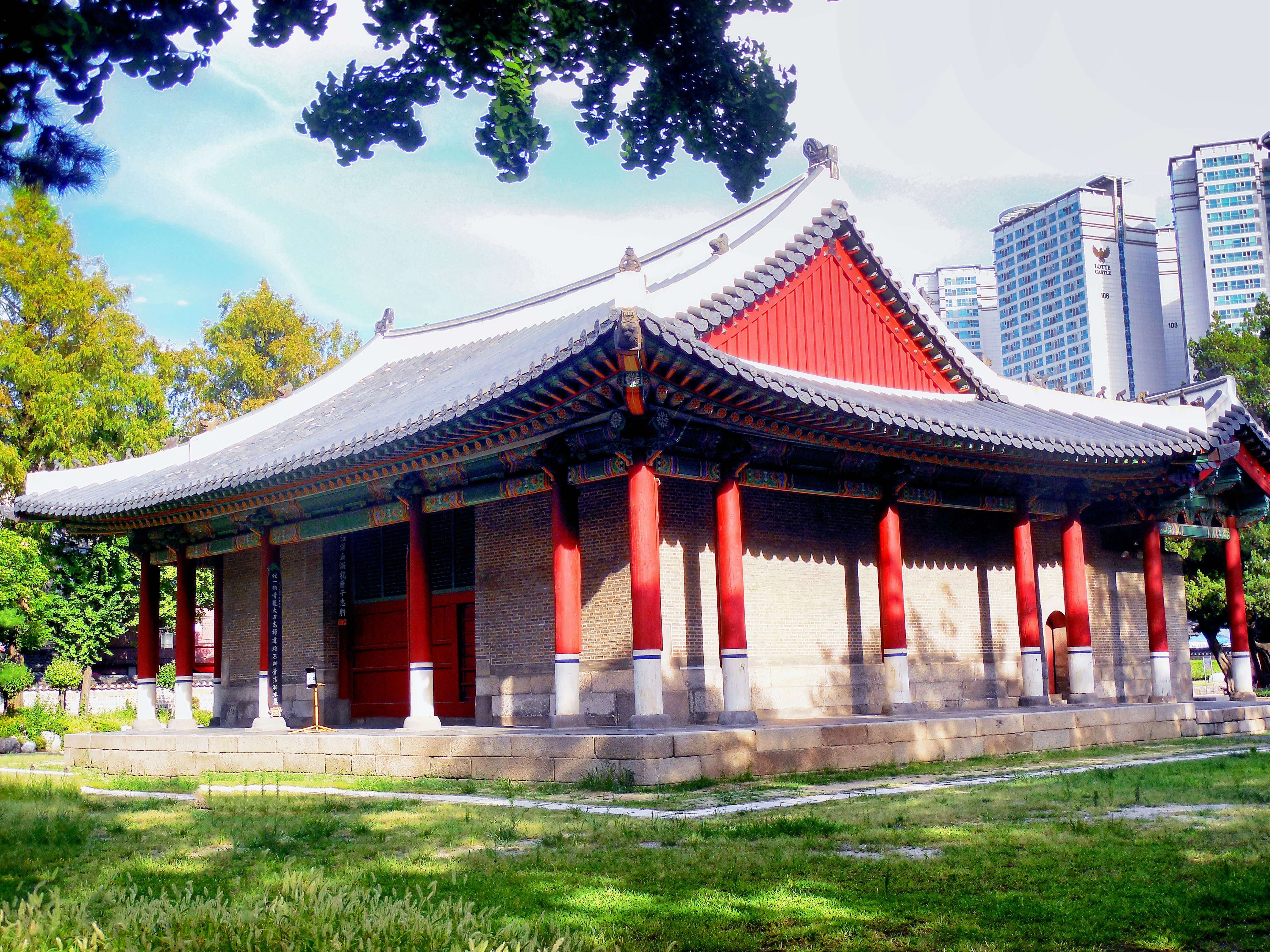 동관왕 묘